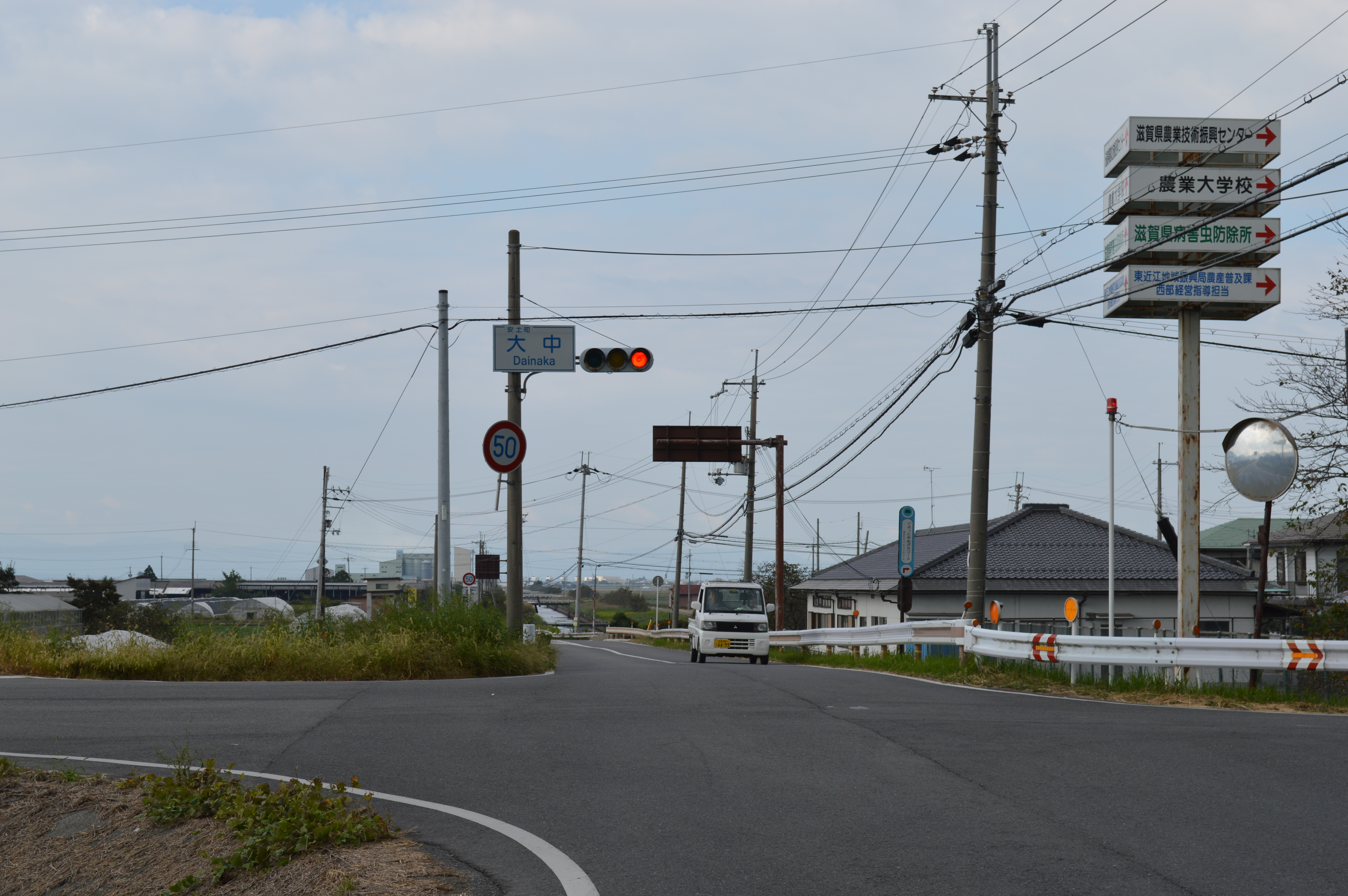 滋賀県近江八幡市の大中湖干拓地にある大中交差点